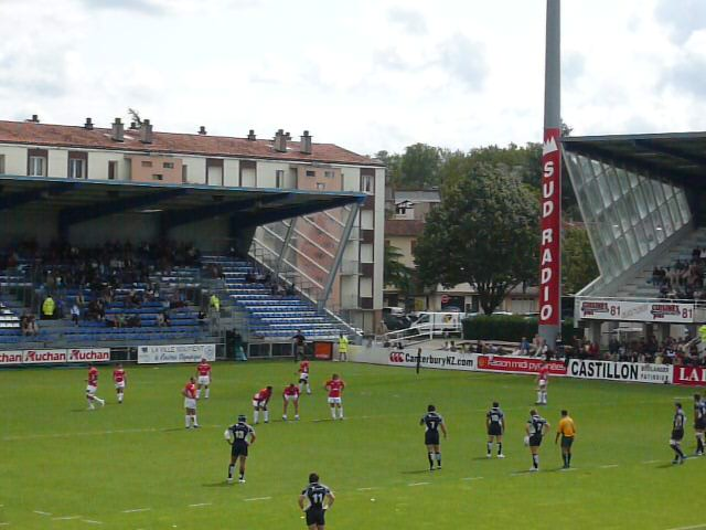 Pénalité d'Anthony Lagardère contre Dax Top 14 2008-2009 — 13 September 2008, Stade Pierre-Antoine. Match between: Castres Olympique — US Dax